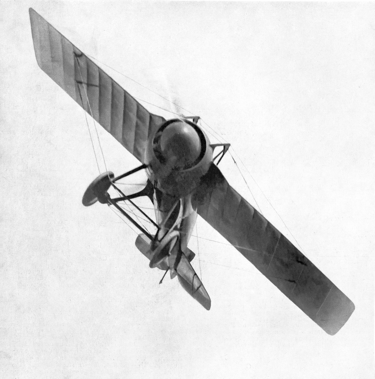 Maurice Prévost vainqueur de la Coupe Gordon Bennett en septembre 1913 (et RM du monde de vitesse, sur monoplan Deperdussin à moteur Gnôme 160 CV, magnéto Bosch, hélice Chauvière et essence Automobiline).